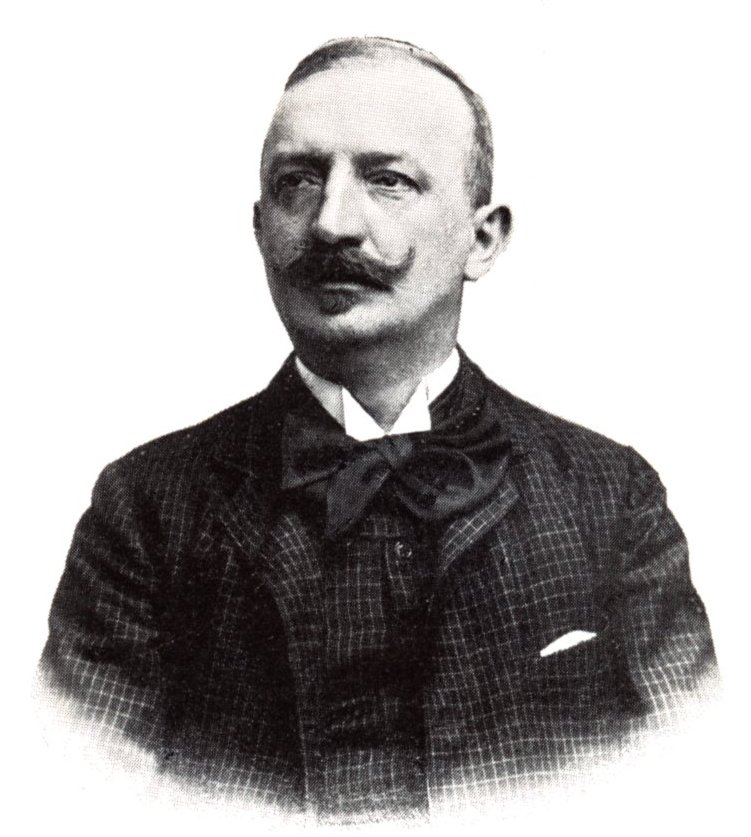 Rákosi Viktor (1860-1923) politikus, író, humorista